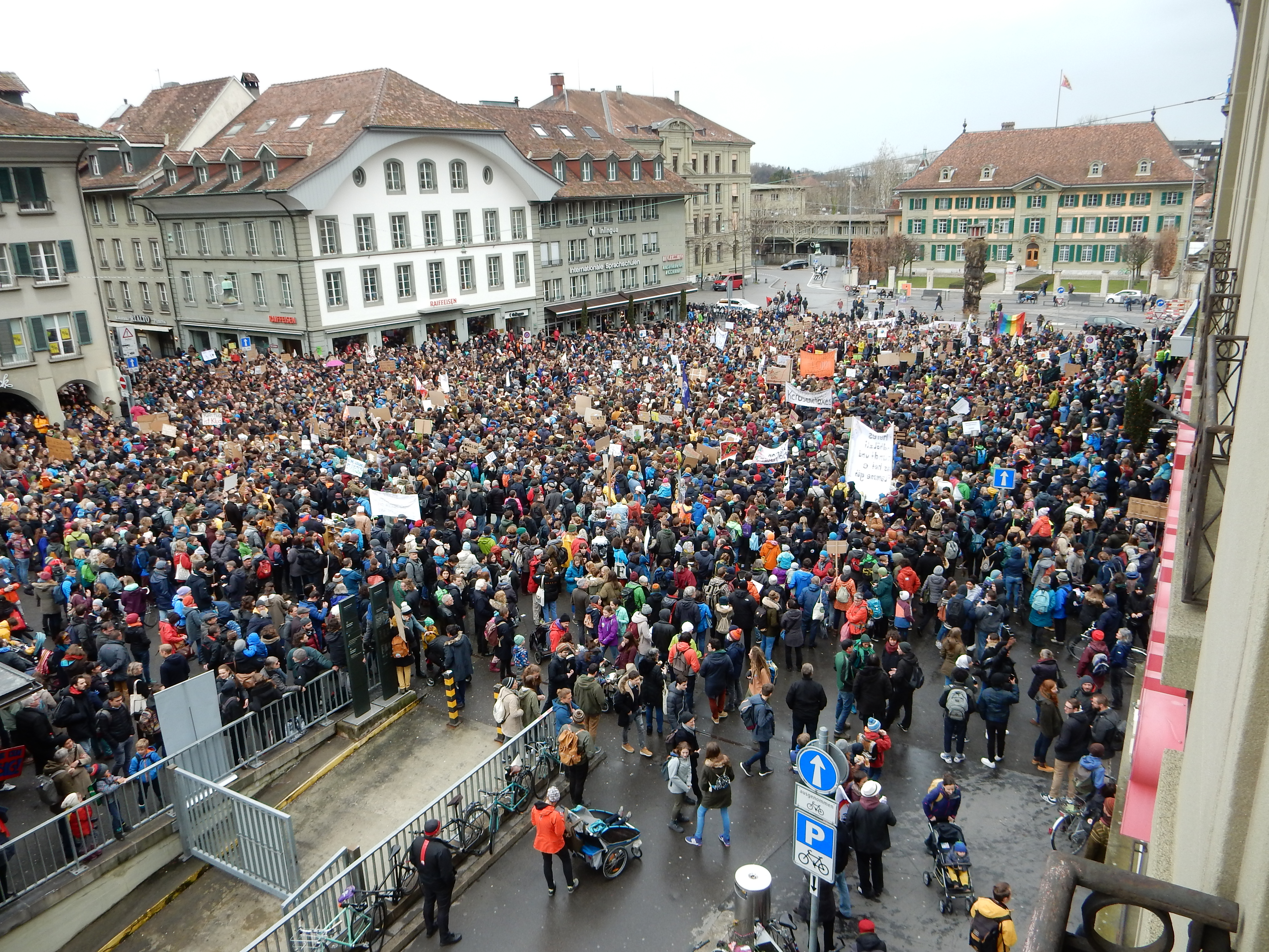 Klimastreikdemo Bern (Schweiz): Kundgebung auf dem Waisenhausplatz